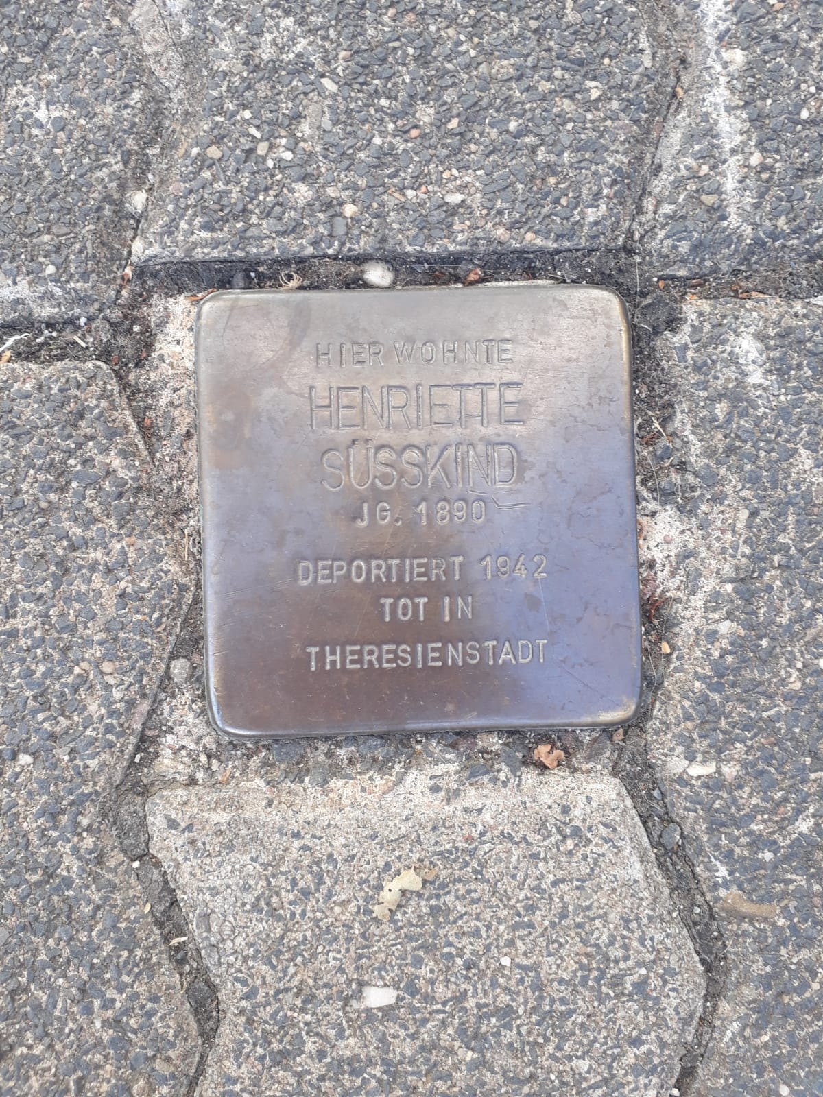 Süsskind